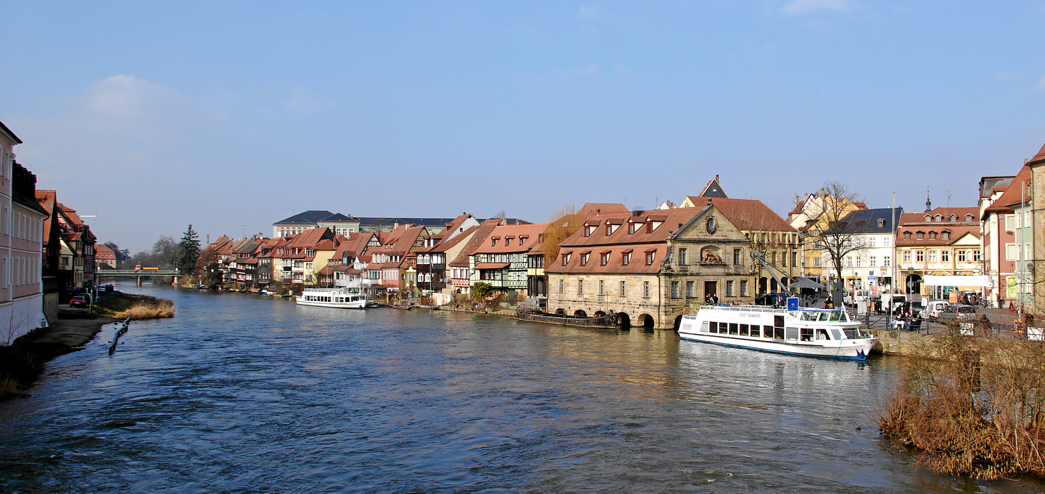 Bamberg, Klein Venedig